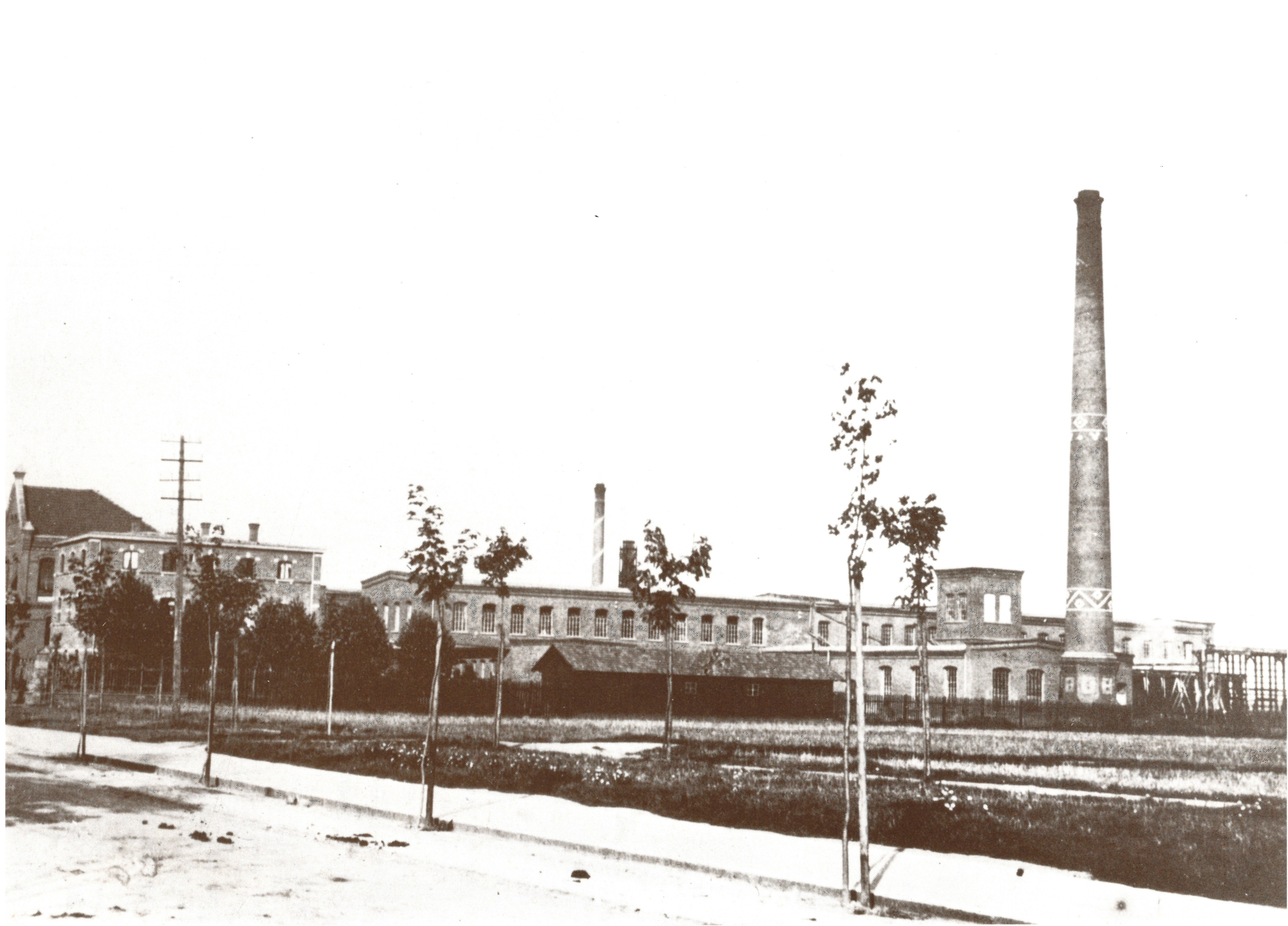 Schweinfurt Fotografie nach 1896: Friedrich Fischer "Erste Automatische Gußstahlkugel-Fabrik"